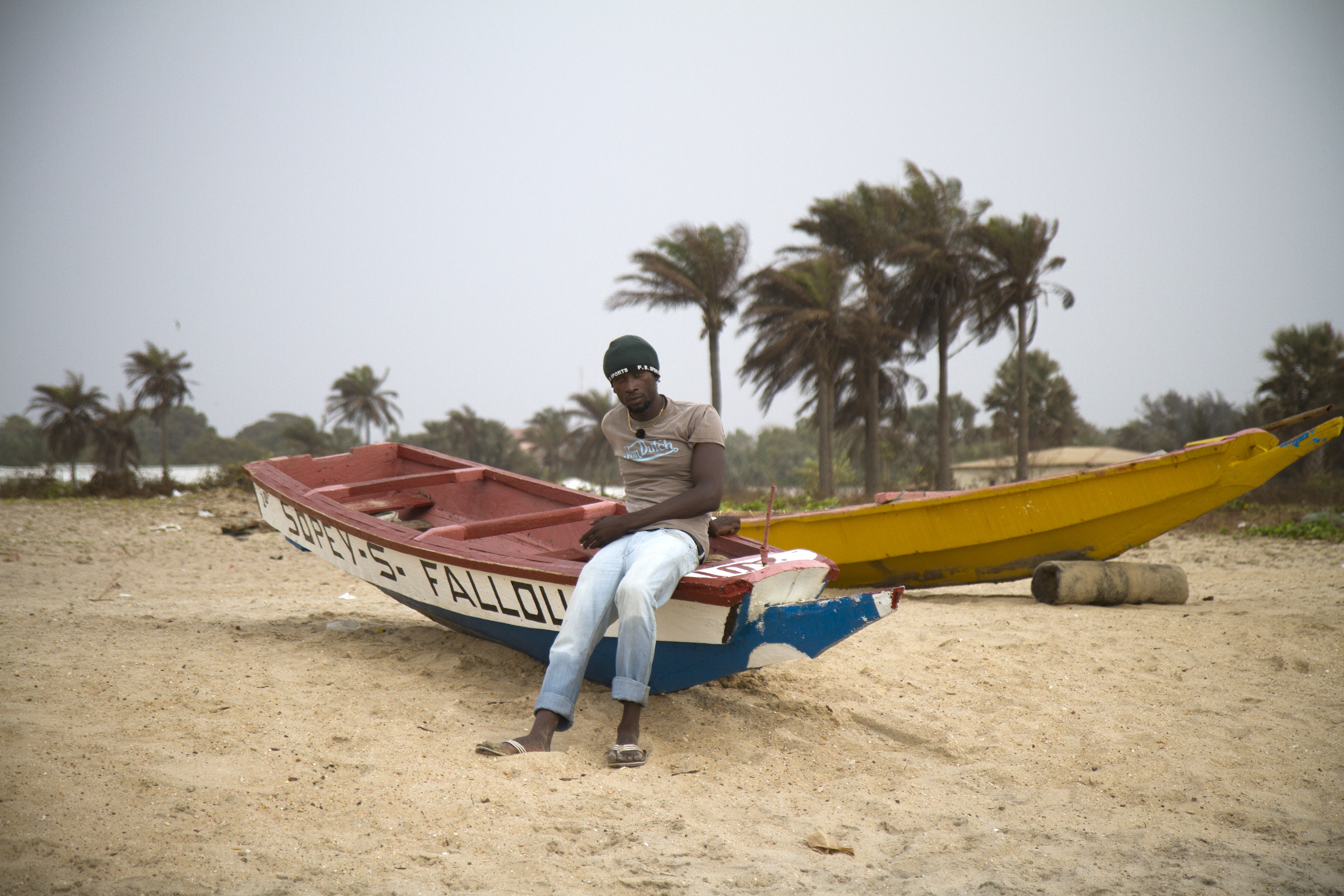 Wandifa sur la plage de Tanji en Gambie. Image tirée du film « Le monde est comme ça » de Fernand Melgar.